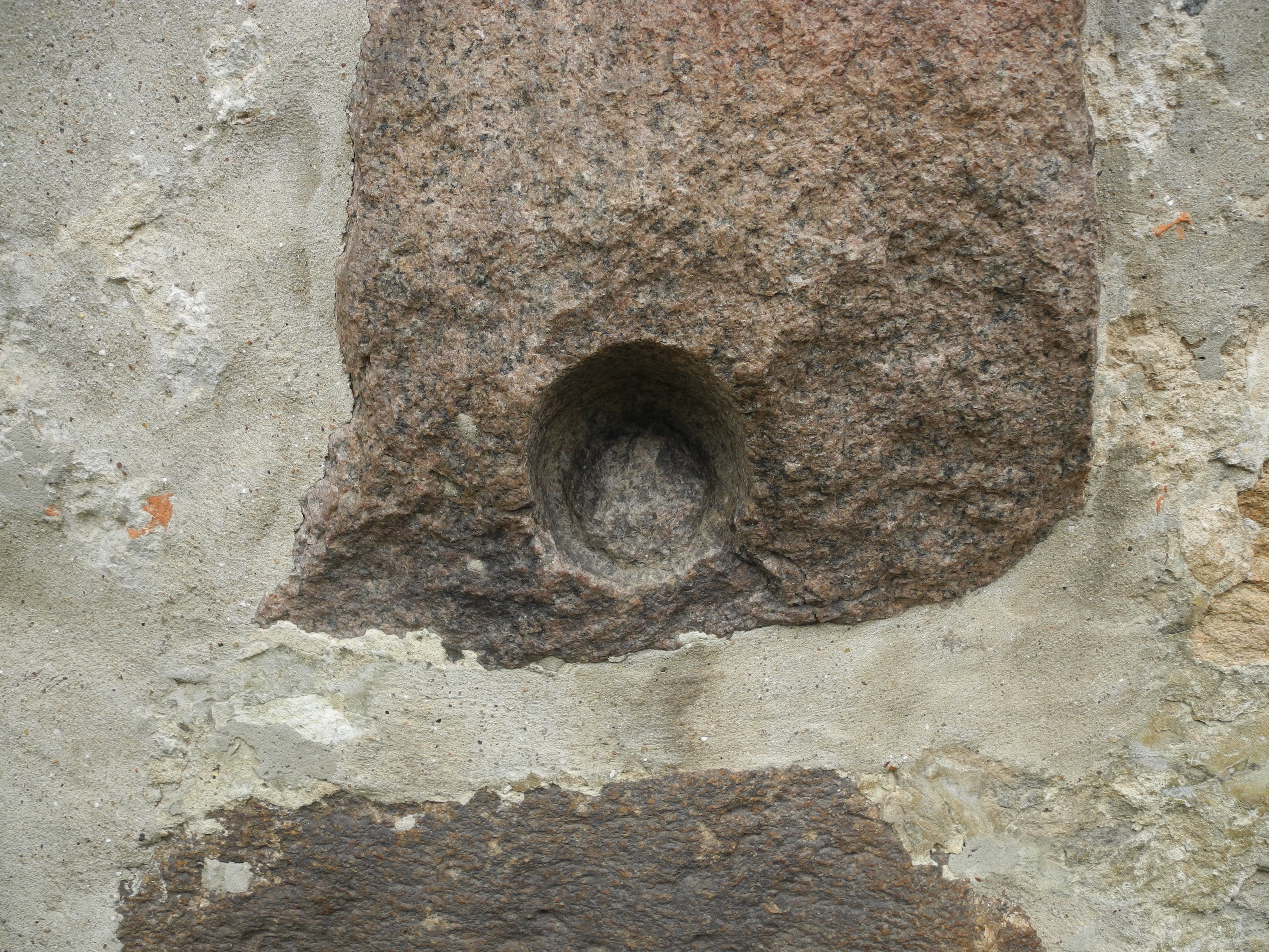 Fußabdruck des Teufels an der Südseite der Kirche St. Cyprian und Cornelius in Ganderkesee (Landkreis Oldenburg, Niedersachsen).